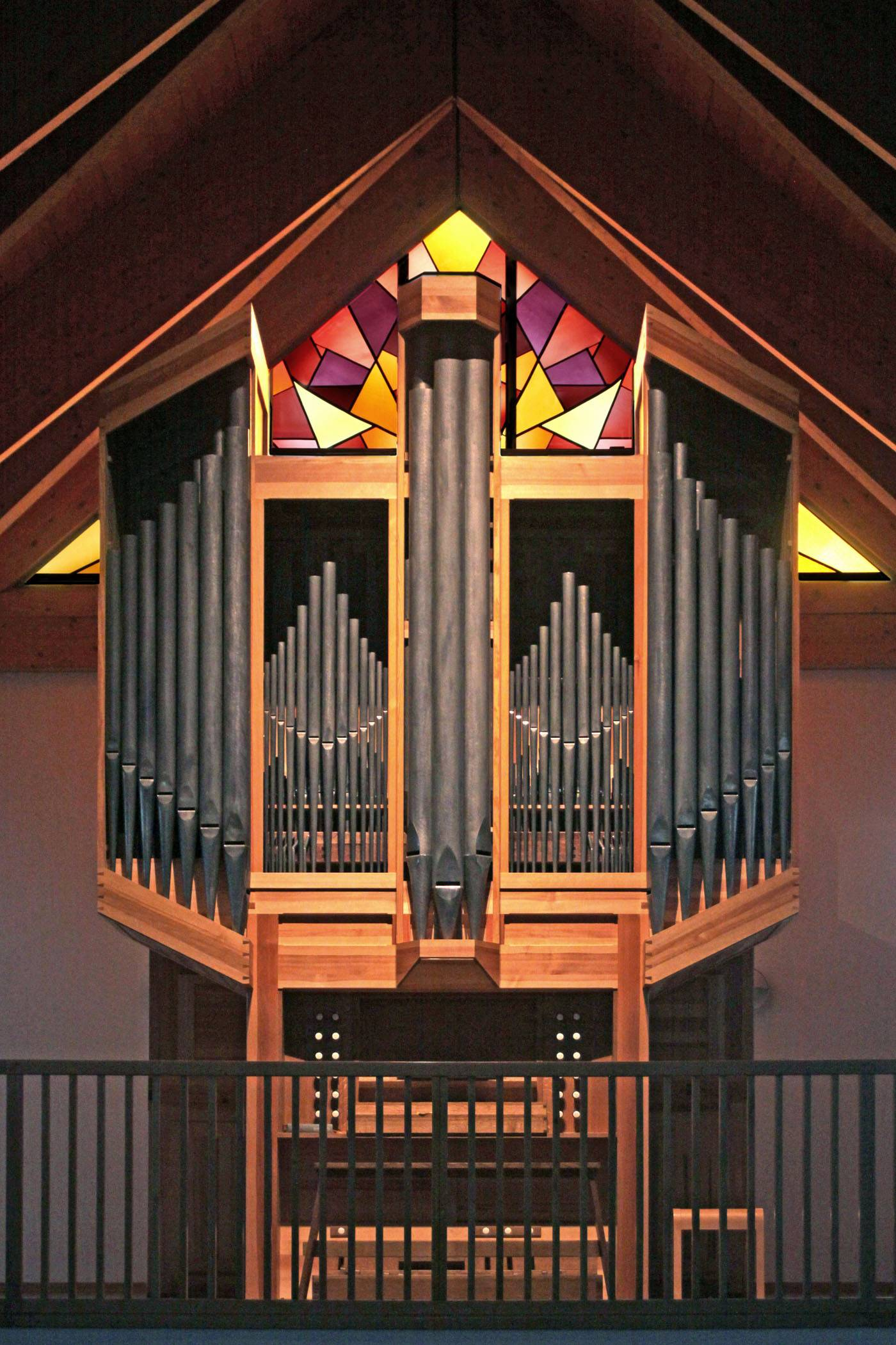 Nelson-Orgel St. Paul Salzburg 7. Juli 2012 inauguriert